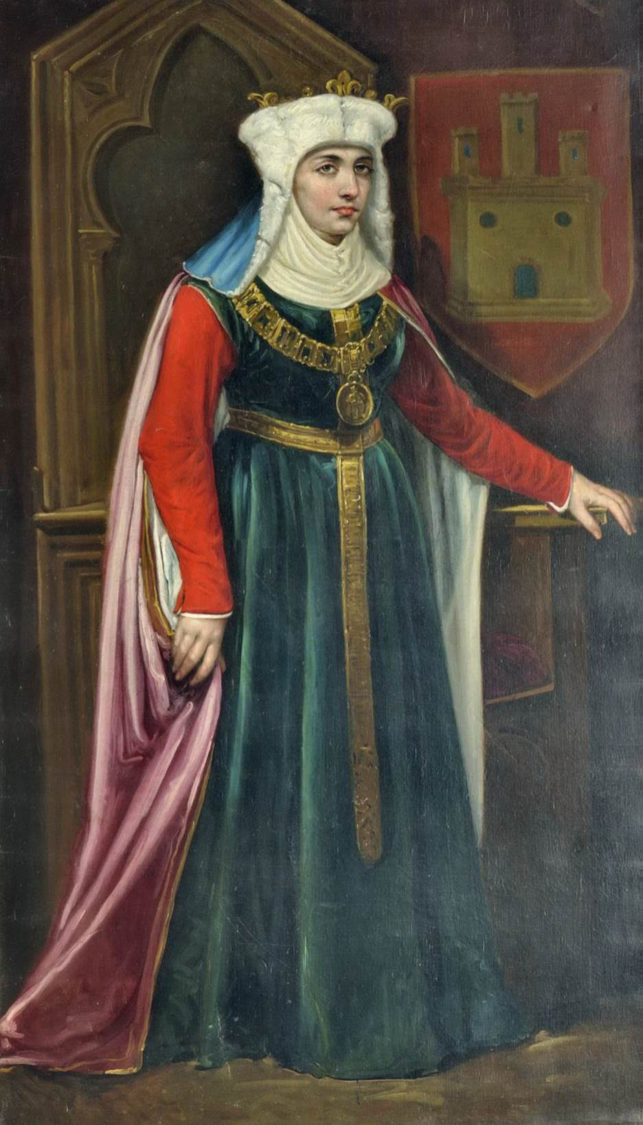 Retrato imaginario de la reina Berenguela de Castilla (c. 1179-1246). Fue hija del rey Alfonso VIII de Castilla y de la reina Leonor de Plantagenet. Sucedió en el trono a su hermano, Enrique I de Castilla e inmediatamente abdicó en favor de su hijo, Fernando III de Castilla.